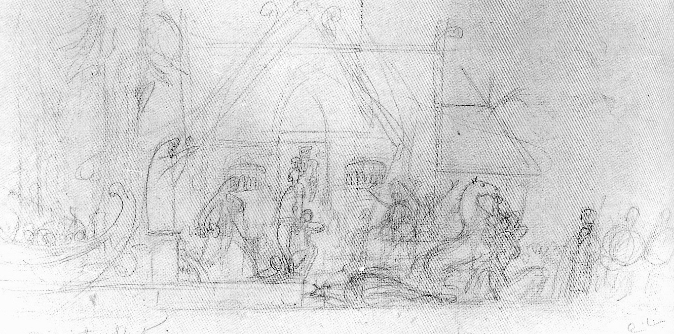 sketch